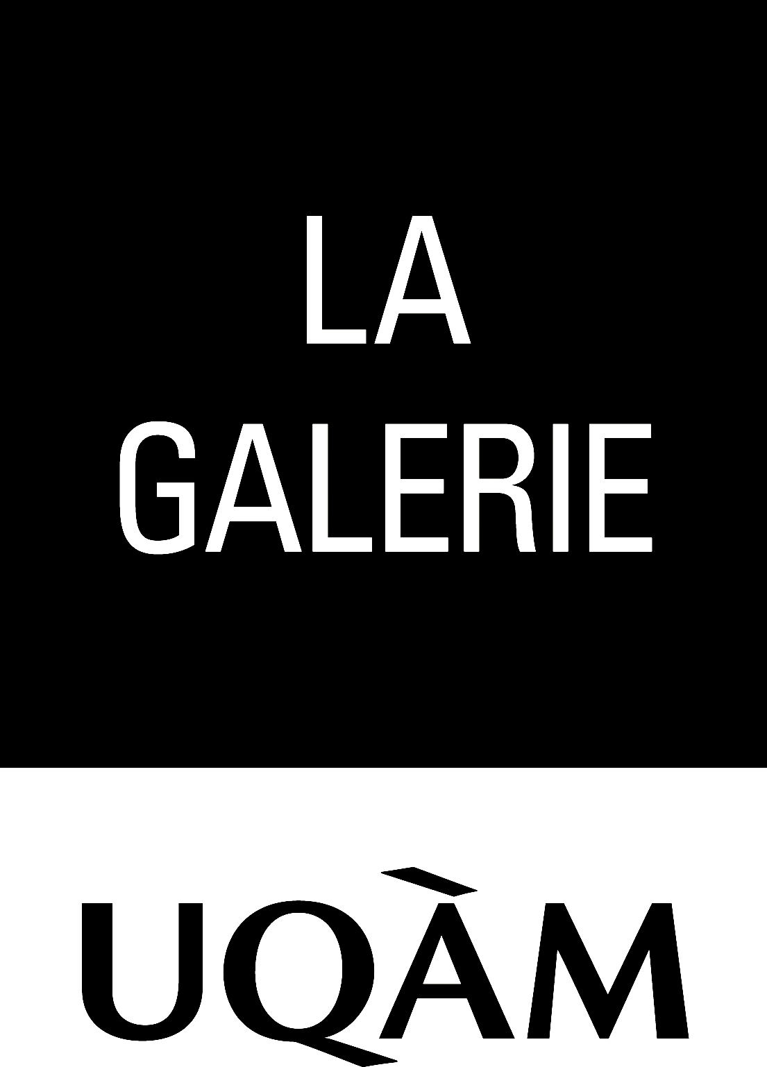 Logo de la Galerie de l'UQAM